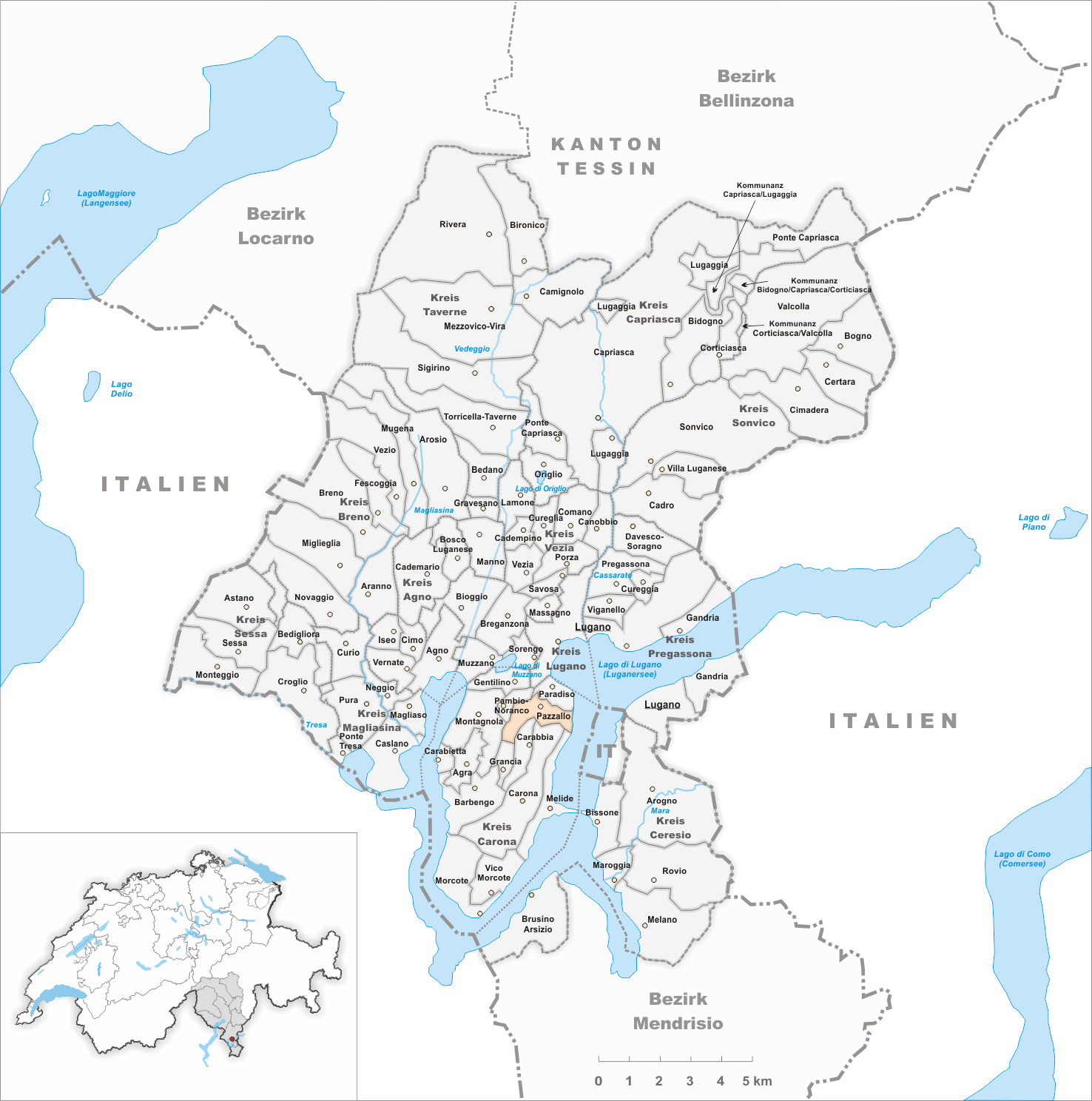 Municipality Pazzallo Artist: Tschubby